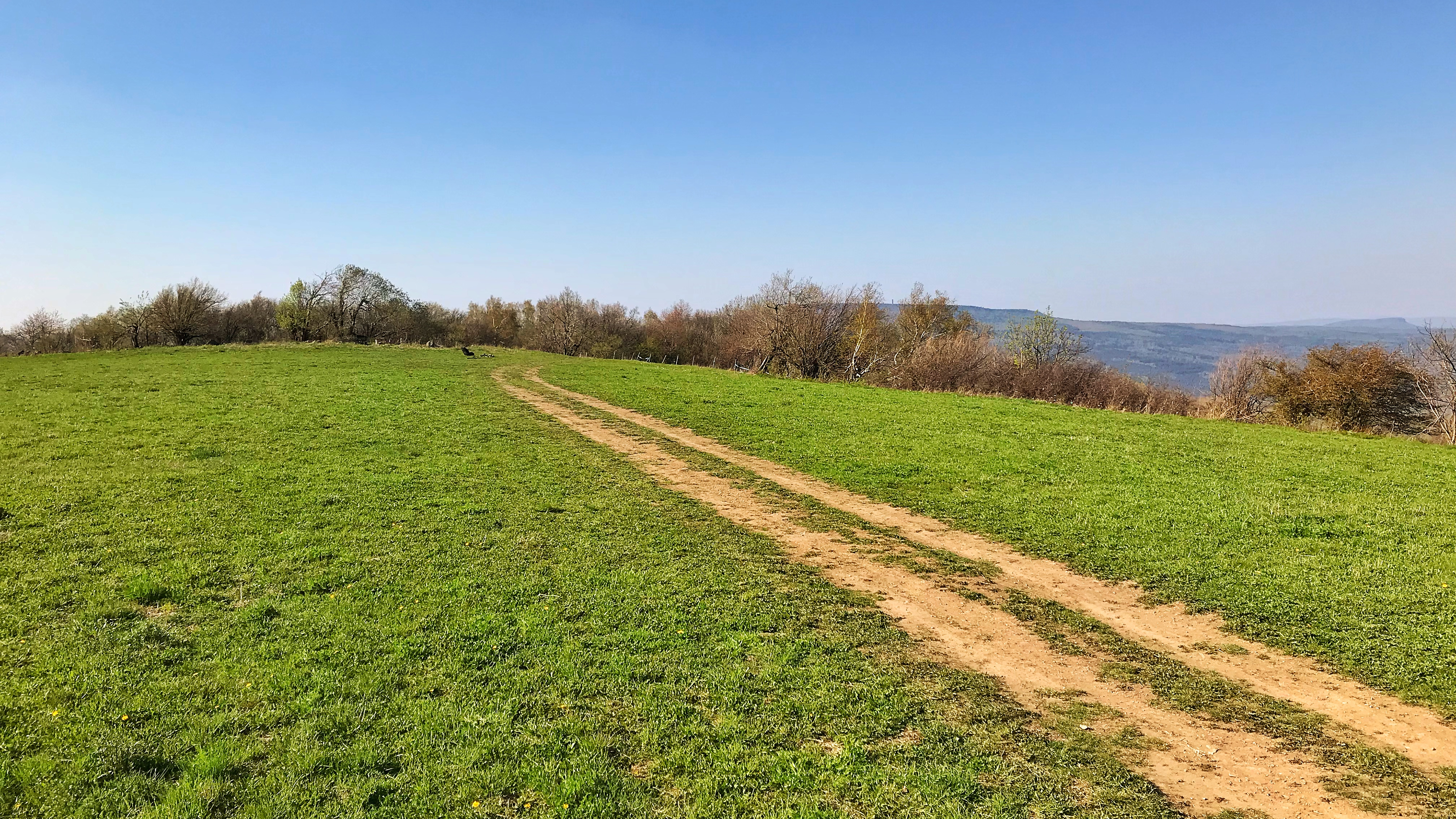 Javorský vrch (617 m) v Českém středohoří